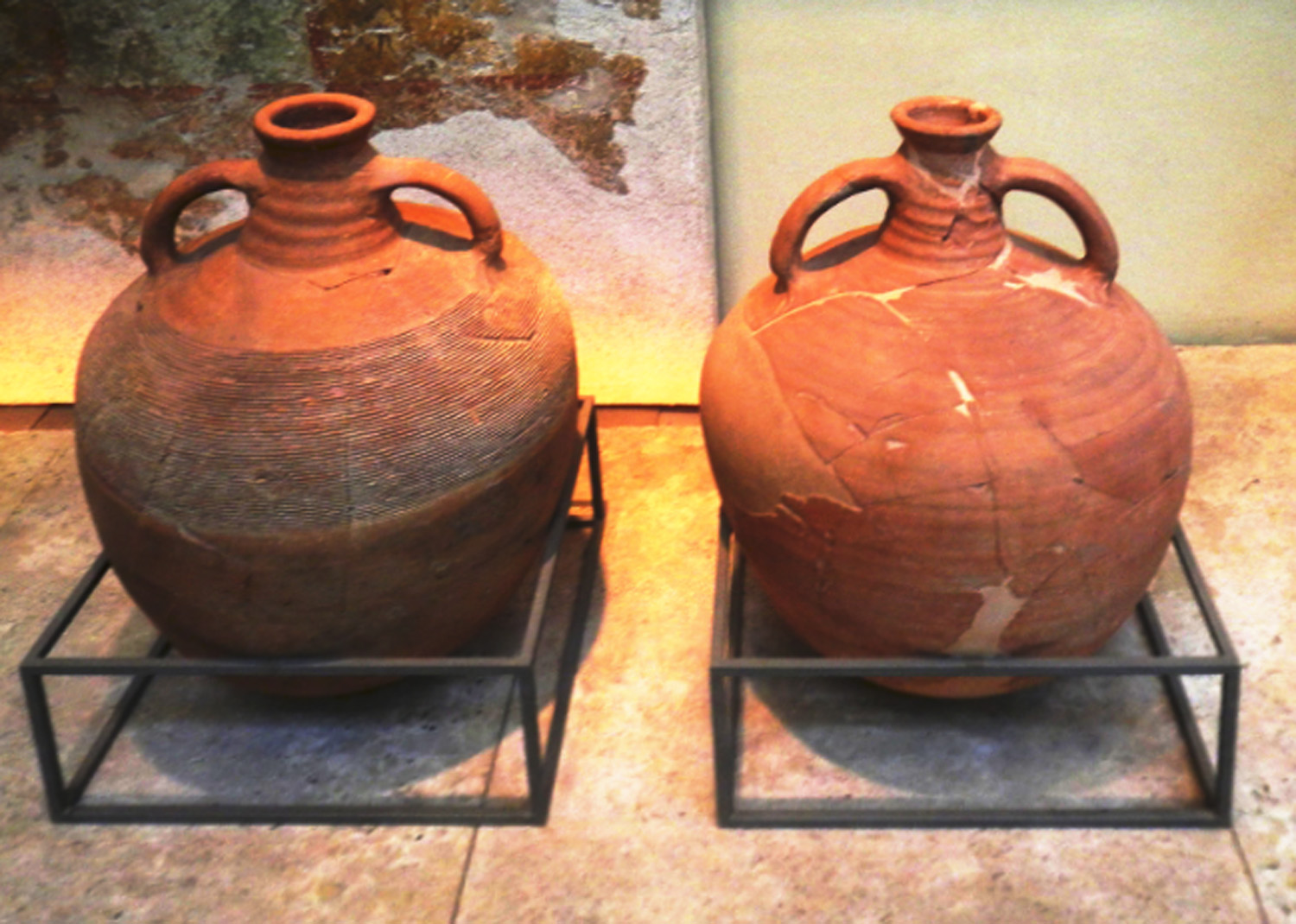 Late Roman Amphora 2 époque byzantine, from the Byzantine and Christiam Musee in Athens.